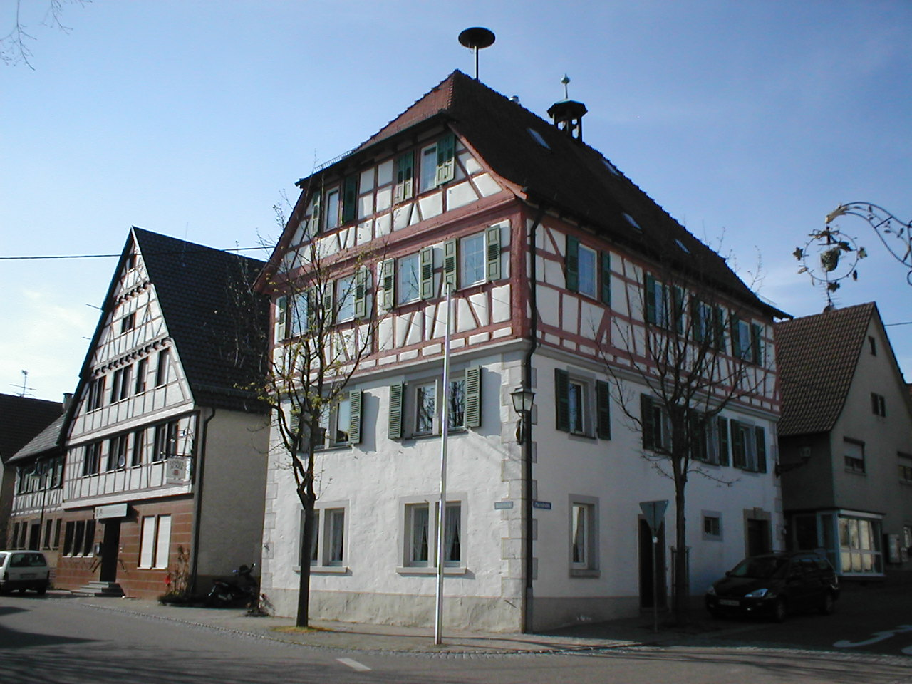 Ehemaliges Rathaus von Stockheim (Brackenheim), erbaut als Deutschordens-Amtshaus 1798